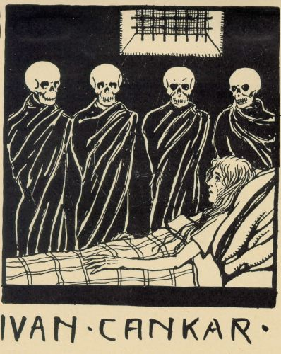 Osnutek ilustracije za Cankarjevo knjigo (neobjavljeno)